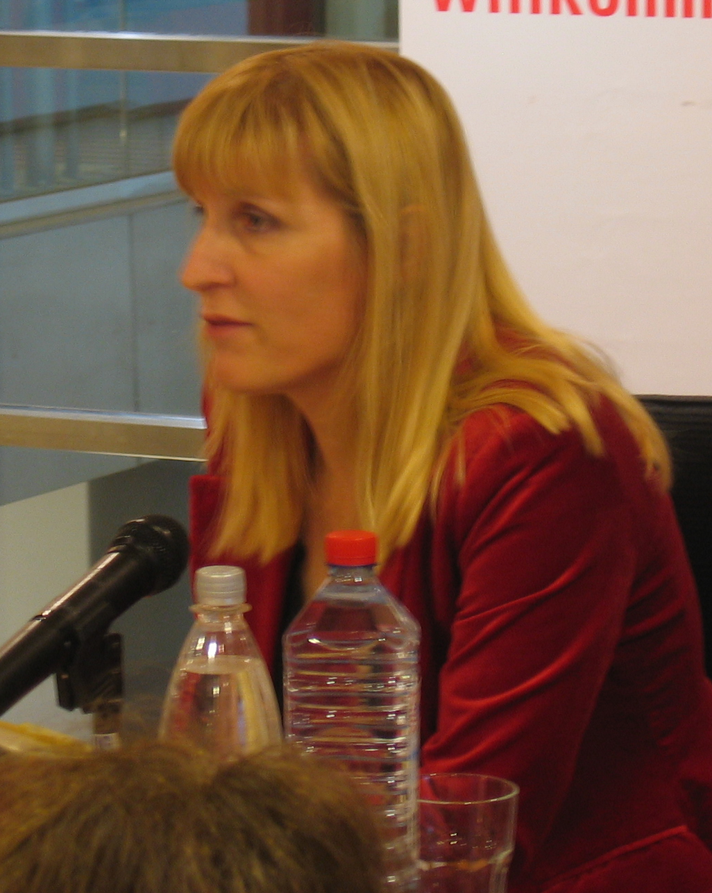 Die Autorin Eva Völler (aka Charlotte Thomas) liest aus ihrem Buch